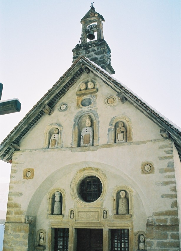 La chapelle des Pétêtes à l'Auberie (Bénévent-et-Charbillac)